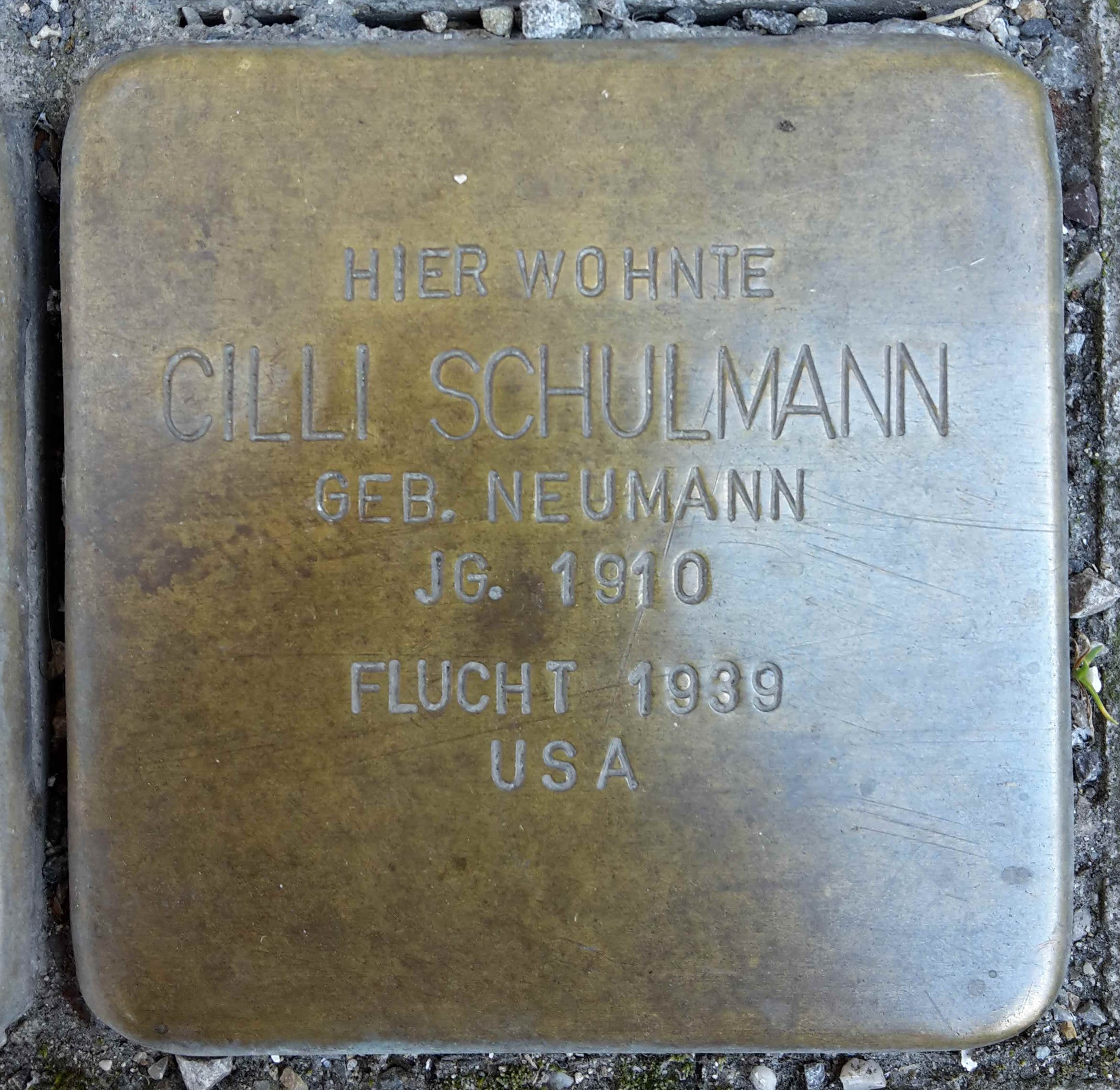 Stolperstein für Cilli Schulmann